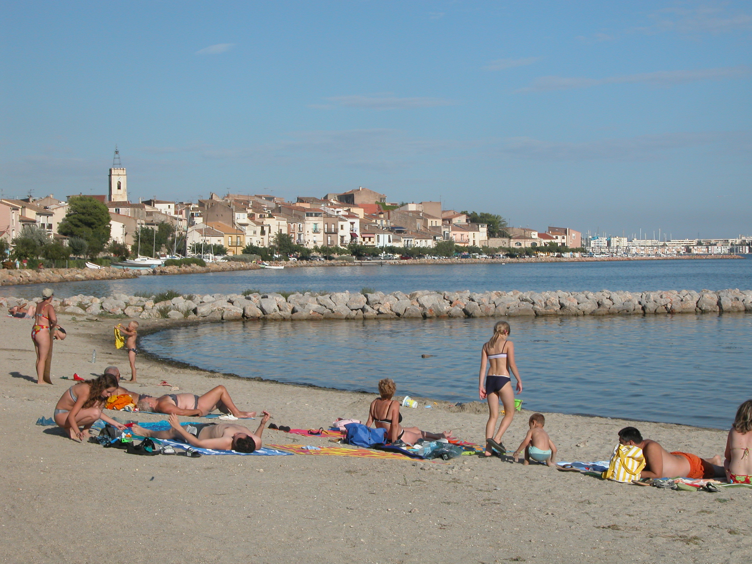 Photo personnelle de Bouzigues (le port) - Eté 2005.